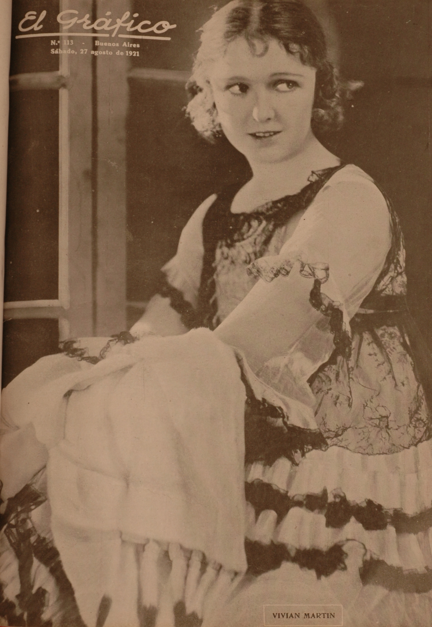 El Grafico del 27 de Agosto de 1921. Edicion 113